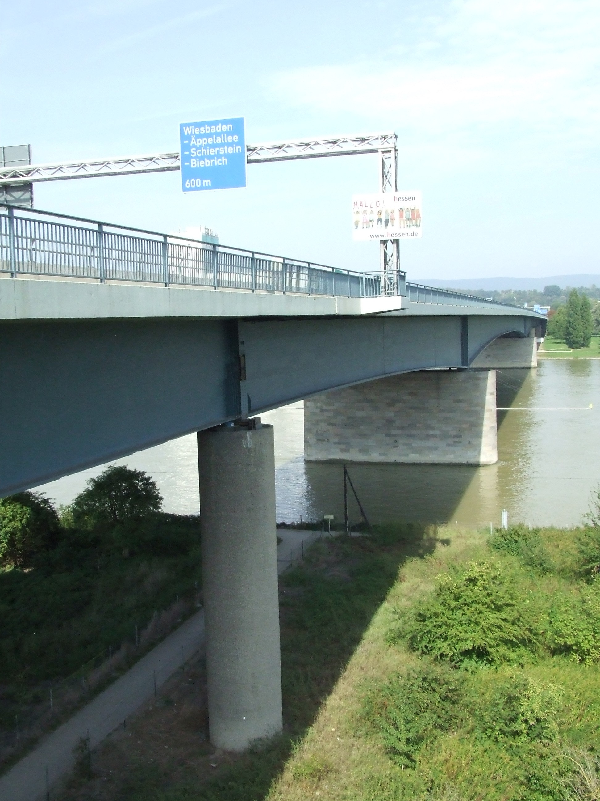 Bridges between Mainz and Wiesbaden - Schiersteiner Brücke zwischen Mainz und Wiesbaden